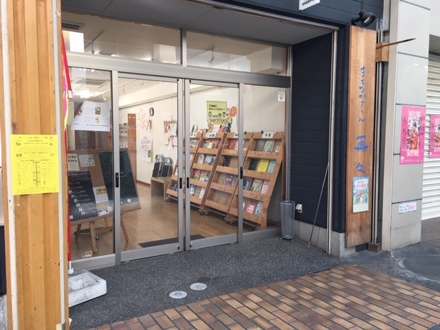 まちなかさろん再々 津山市堺町のまちづくり活動拠点施設